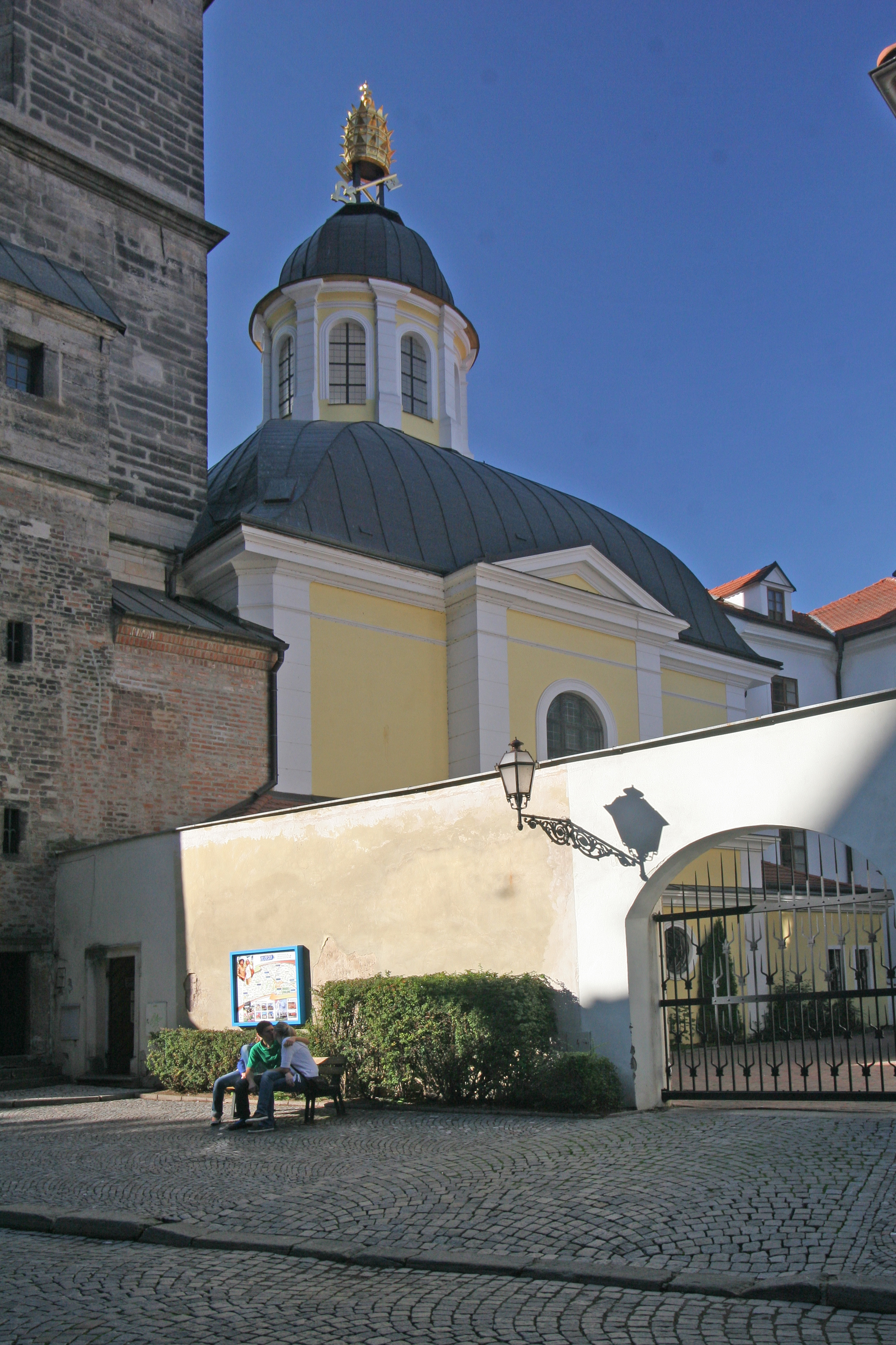 Kaple sv. Klimenta, Bílá věž (Hradec Králové), roh ul. Rokitanského a Franušovy 168, Hradec Králové